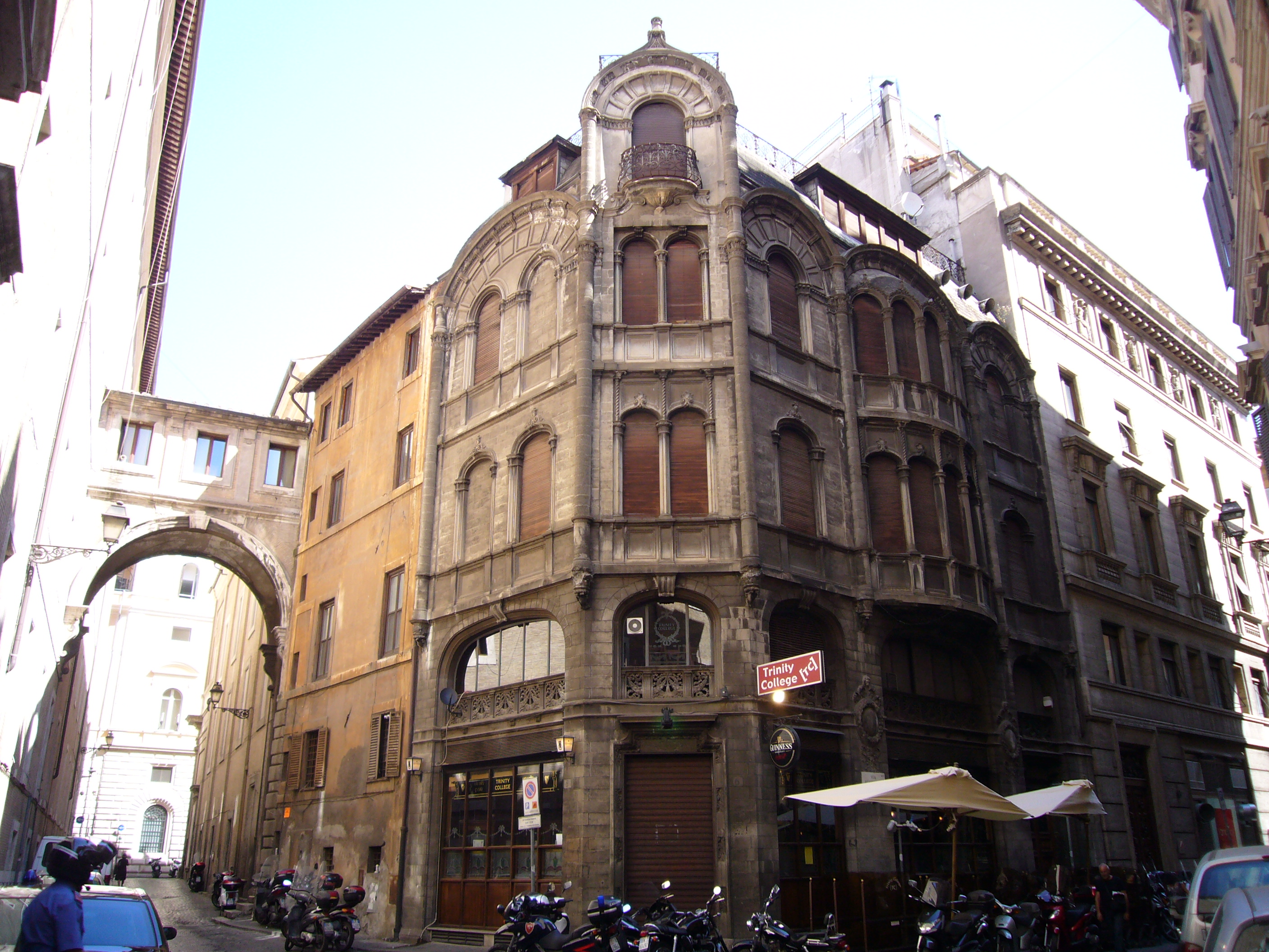 Roma, palazzetto Calzoni a via del Collegio Romano angolo via Specchi (1902)